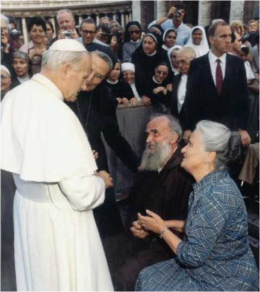 Frei Alberto e familiares com João Paulo II em alguns momentos da cerimônia de beatificação da irmã Gianna.